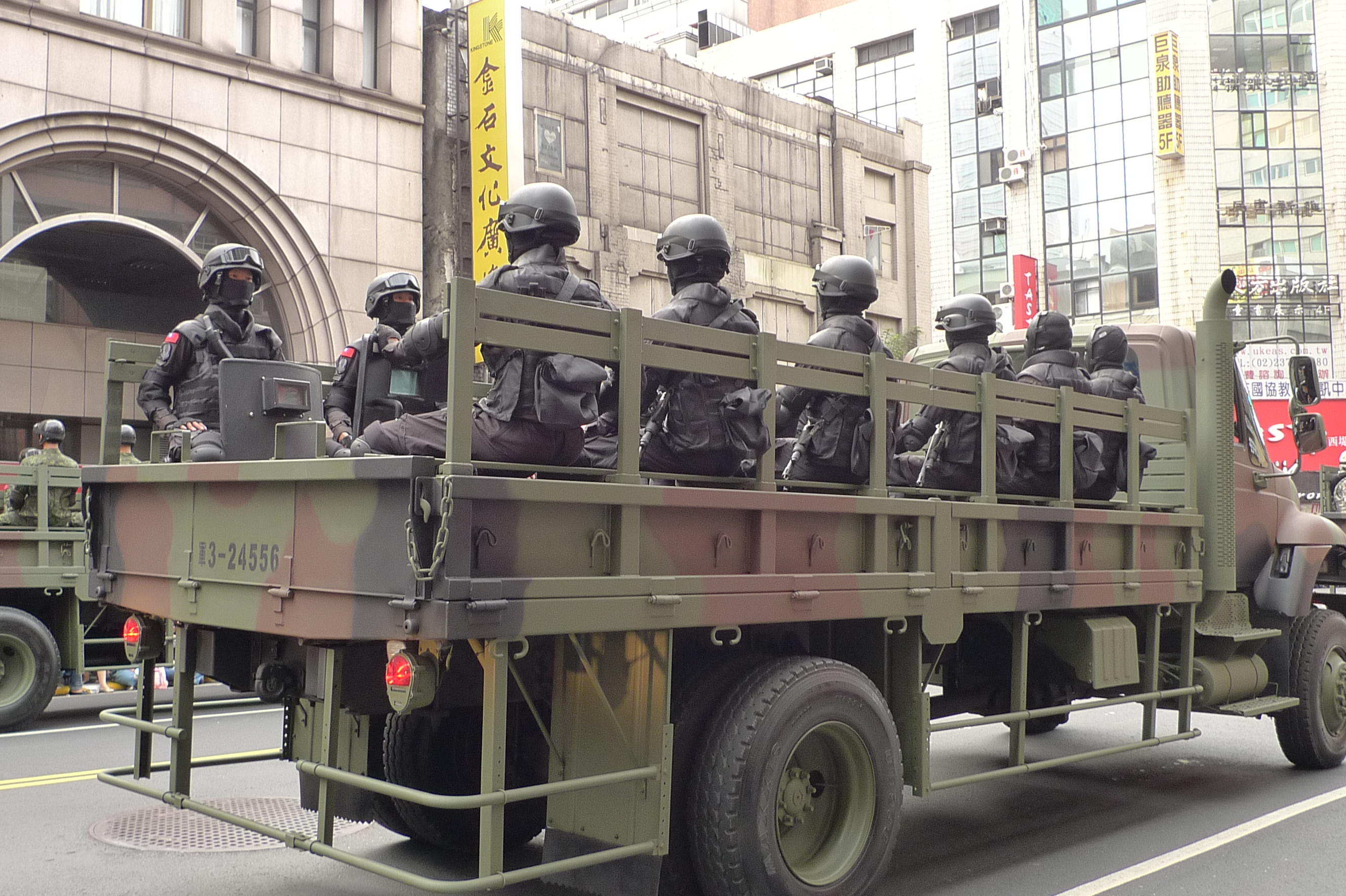 中華民国陸軍特殊部隊